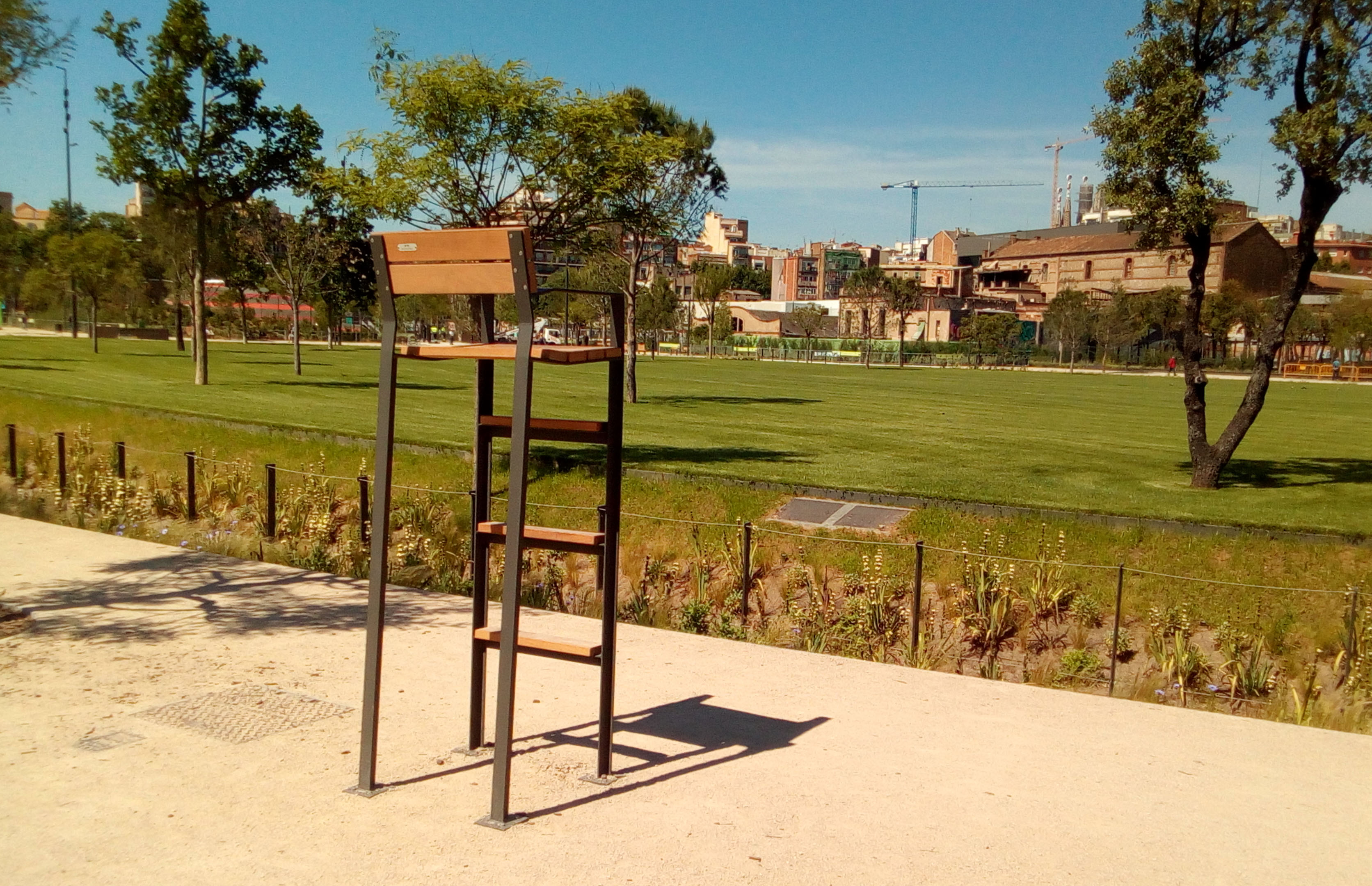 Parque de las Glorias.